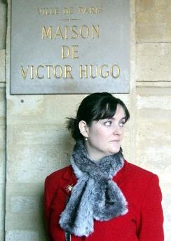 Nuala Ní Chonchúir